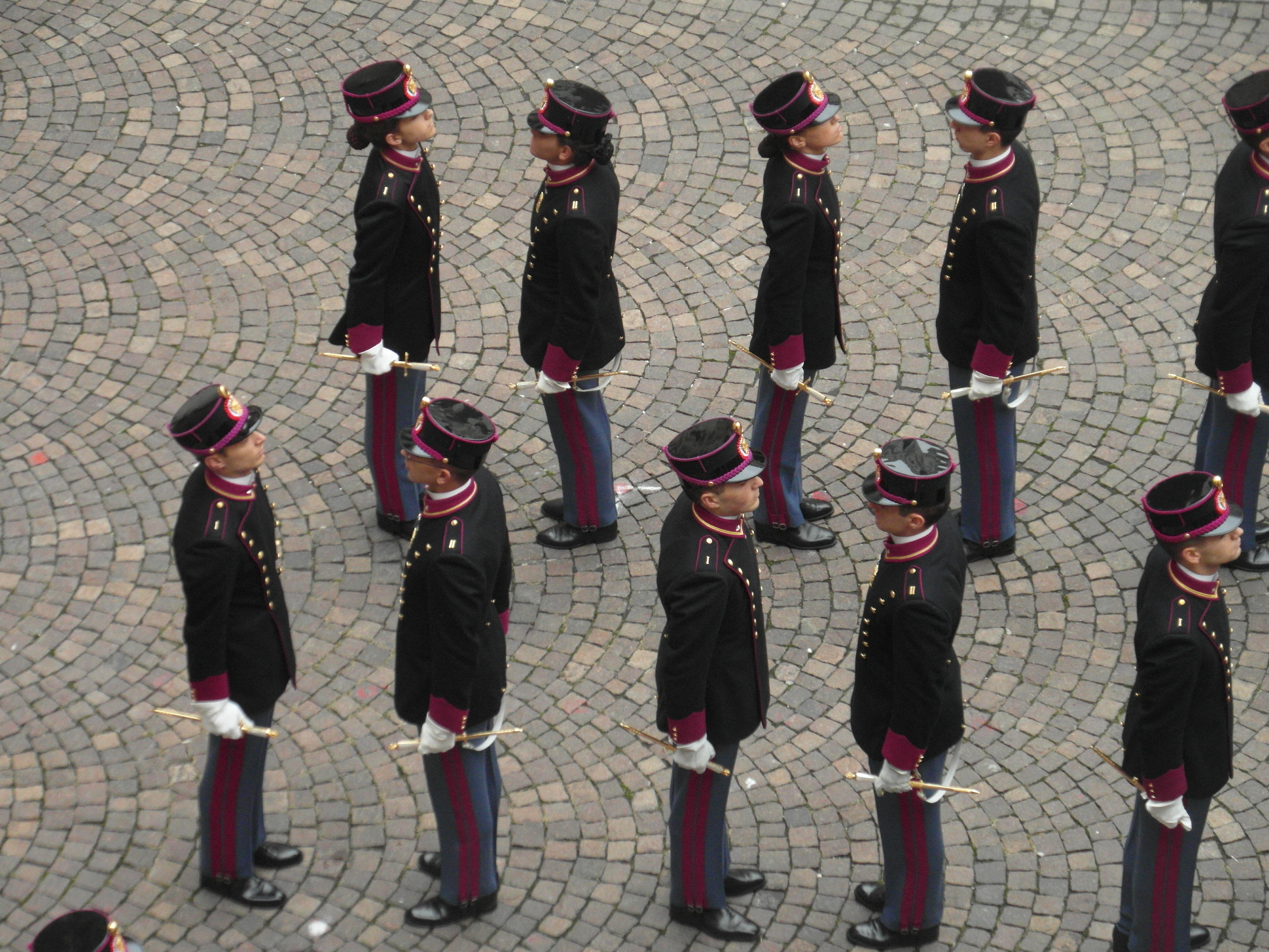 Cerimonia consegna spadino 2012 - Cadetti dispiegati